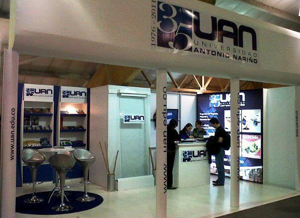 Stand